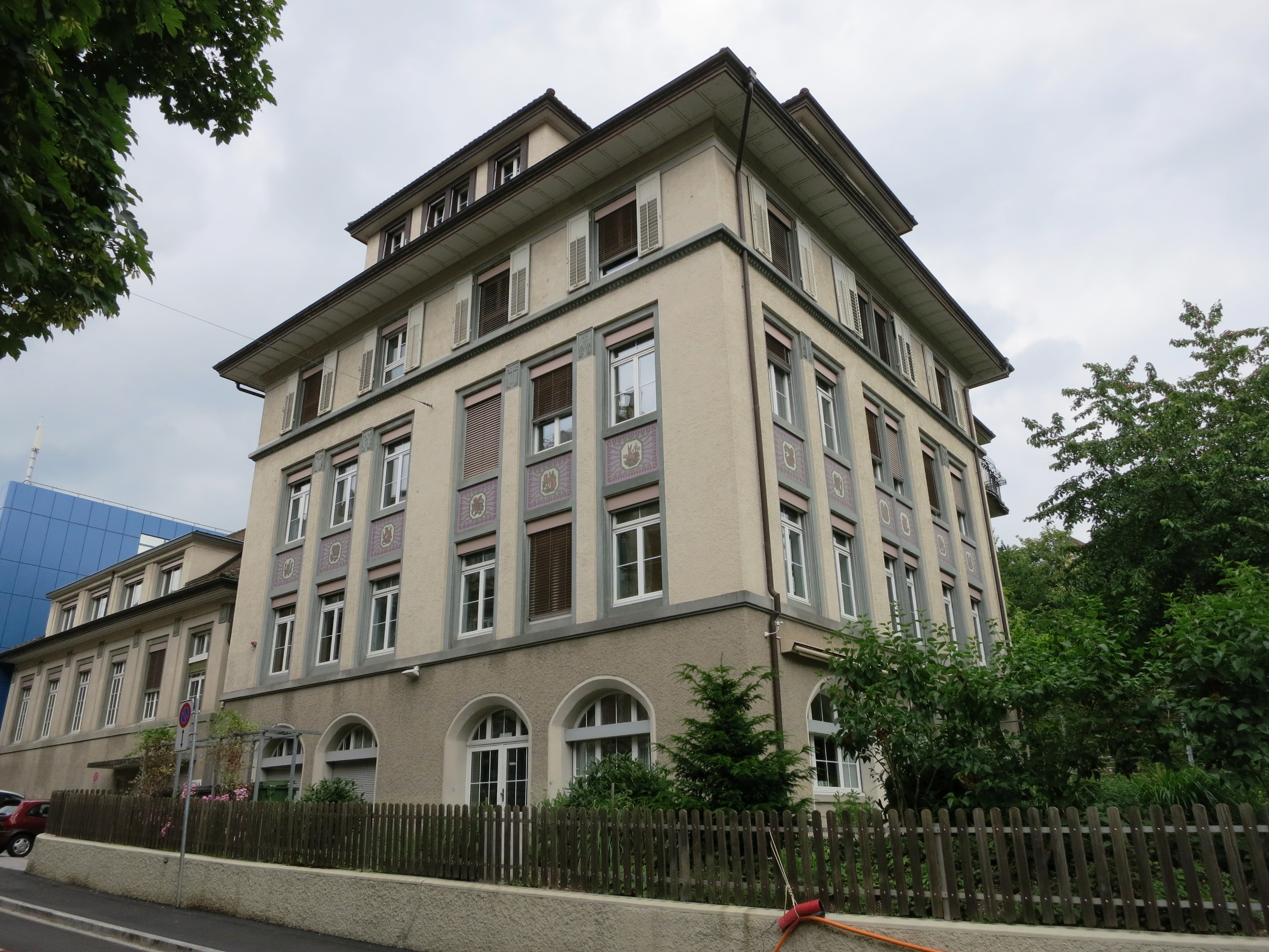 Kantonales Labor, ehemalige Pestalozzischule, Zürich-Hottingen, Schweiz